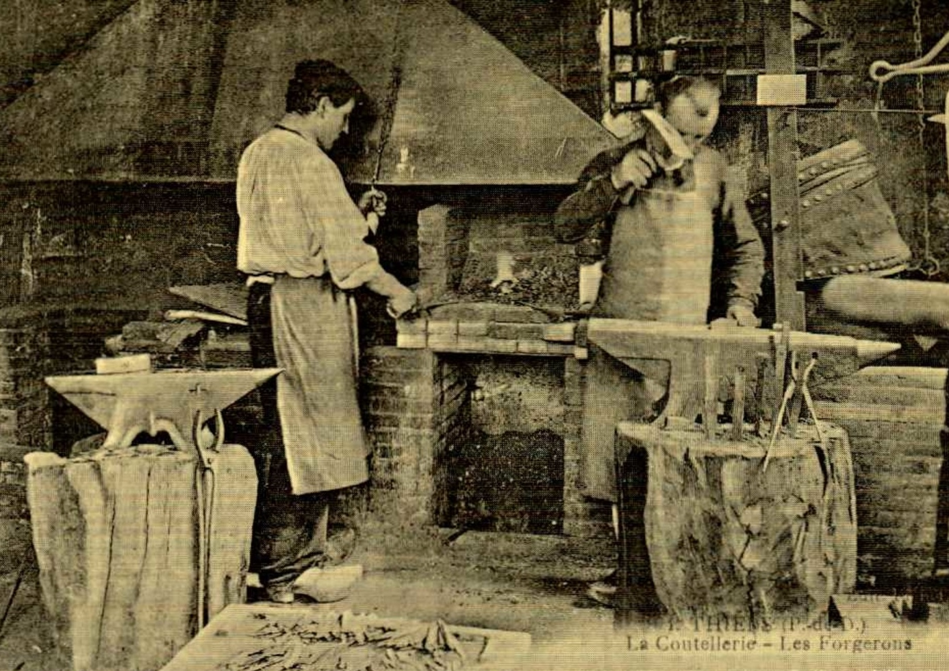 Forgerons qui transforment les barres d'aciers en lames de couteaux à Thiers (Auvergne)